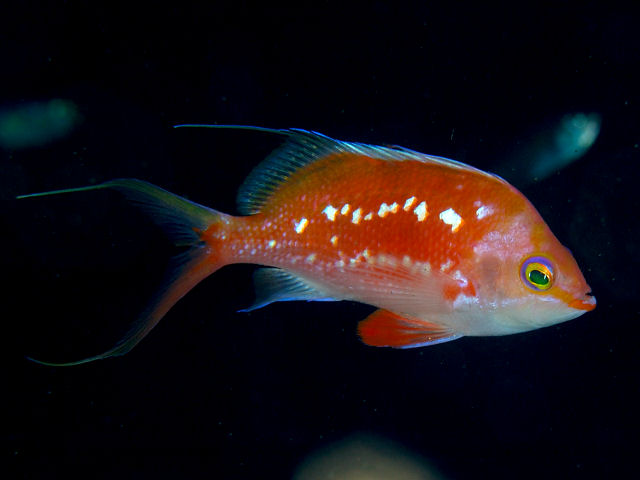 サクラダイ♂ Sacura margaritacea